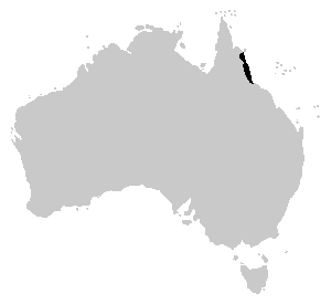 Domaine de distribution Nyctimystes